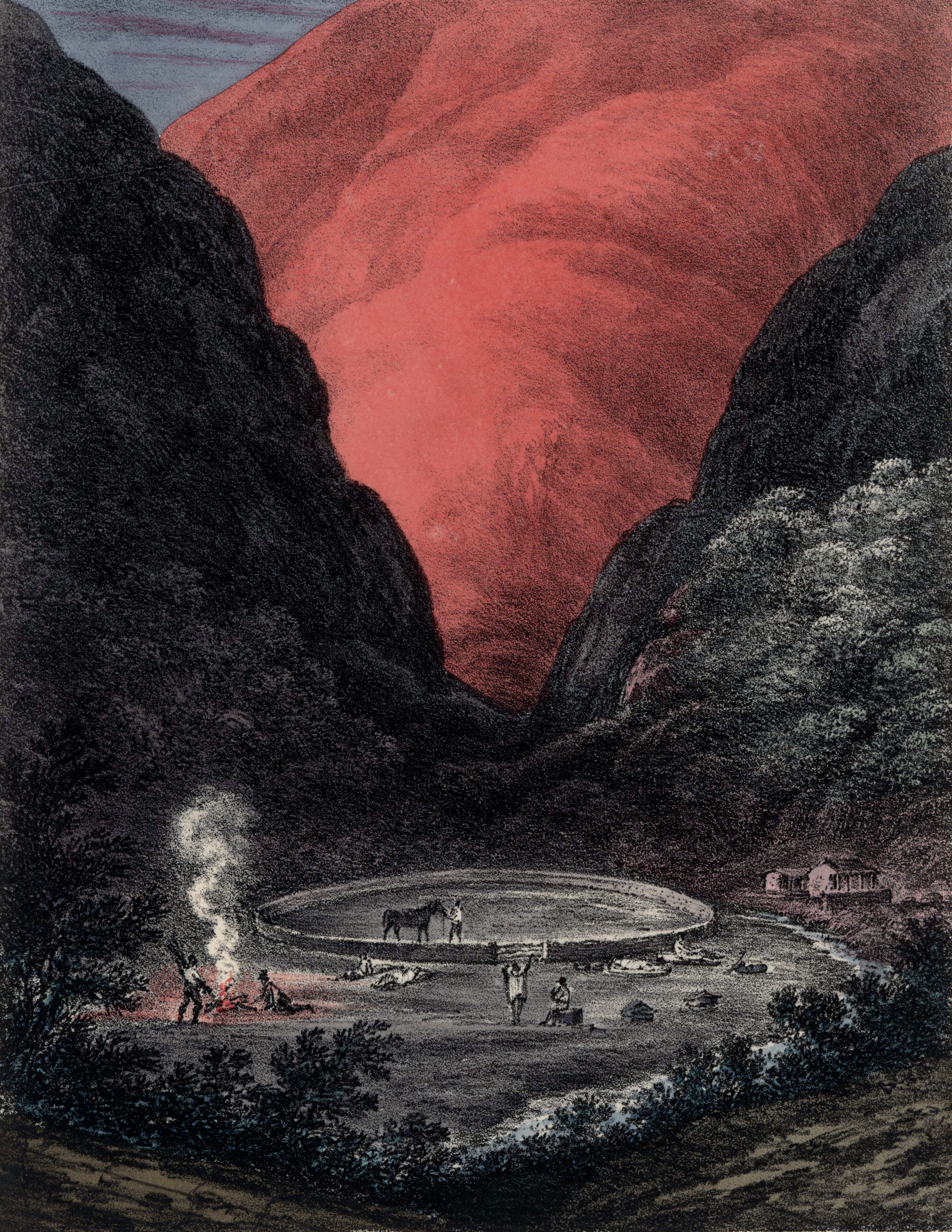 Amanecer en Villavicencio (hoy reserva natural en el departamento Las Heras, provincia de Mendoza, Argentina) ; la luz del sol colorea parte del paisaje; los hombres han prendido fuego para desayunar. Dibujo del viajero y filántropo inglés Peter Schmidtmeyer; litografía coloreada de Agostino Aglio; impresa por Rowney & Forster y publicada en el de libro de Schmidtmeyer Travels into Chile, over the Andes, in the years 1820 and 1821, London: Longman, Hurst, Rees, Orme, Brown and Green, 1824.